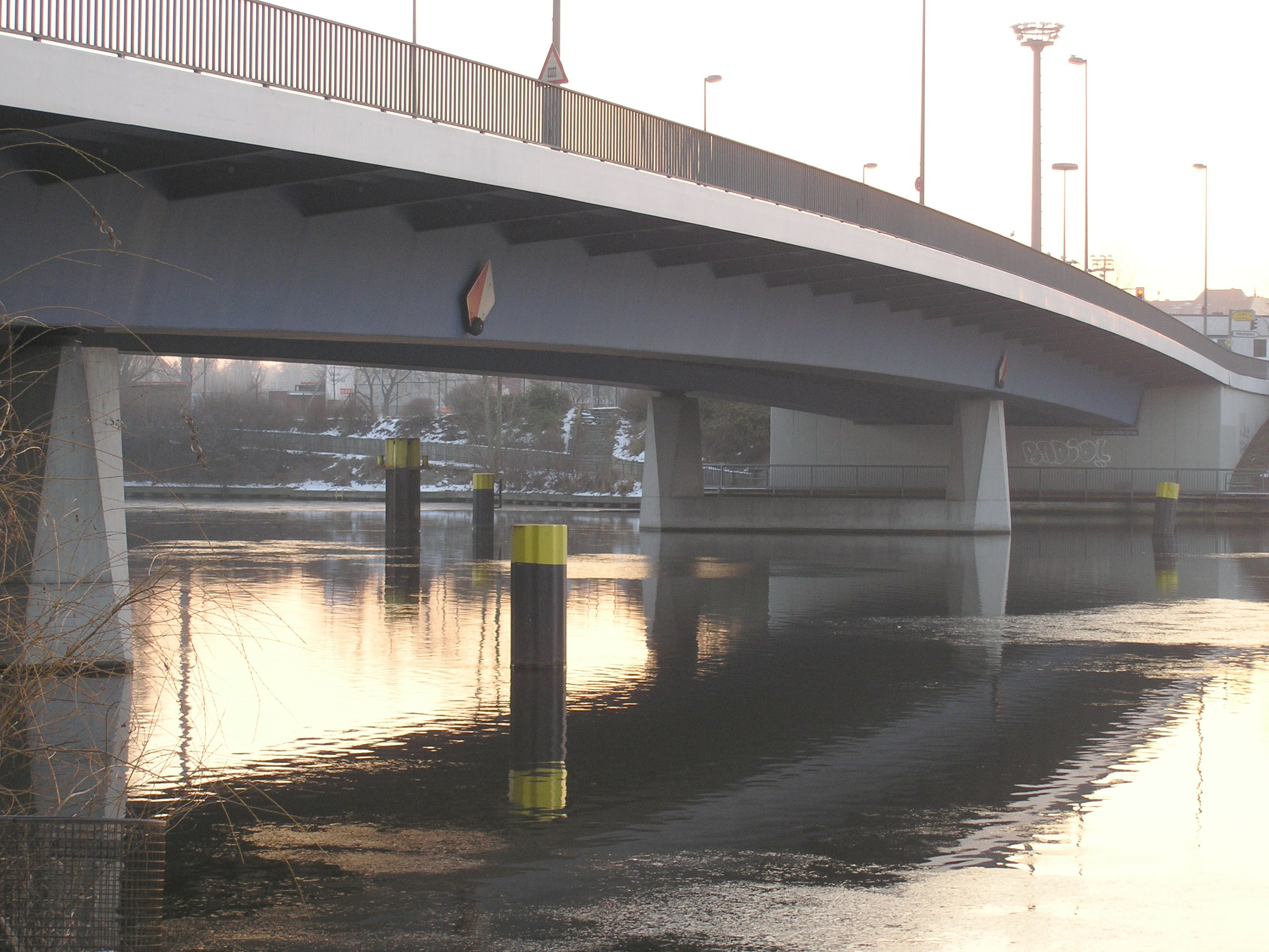 Nordhafenbrücke